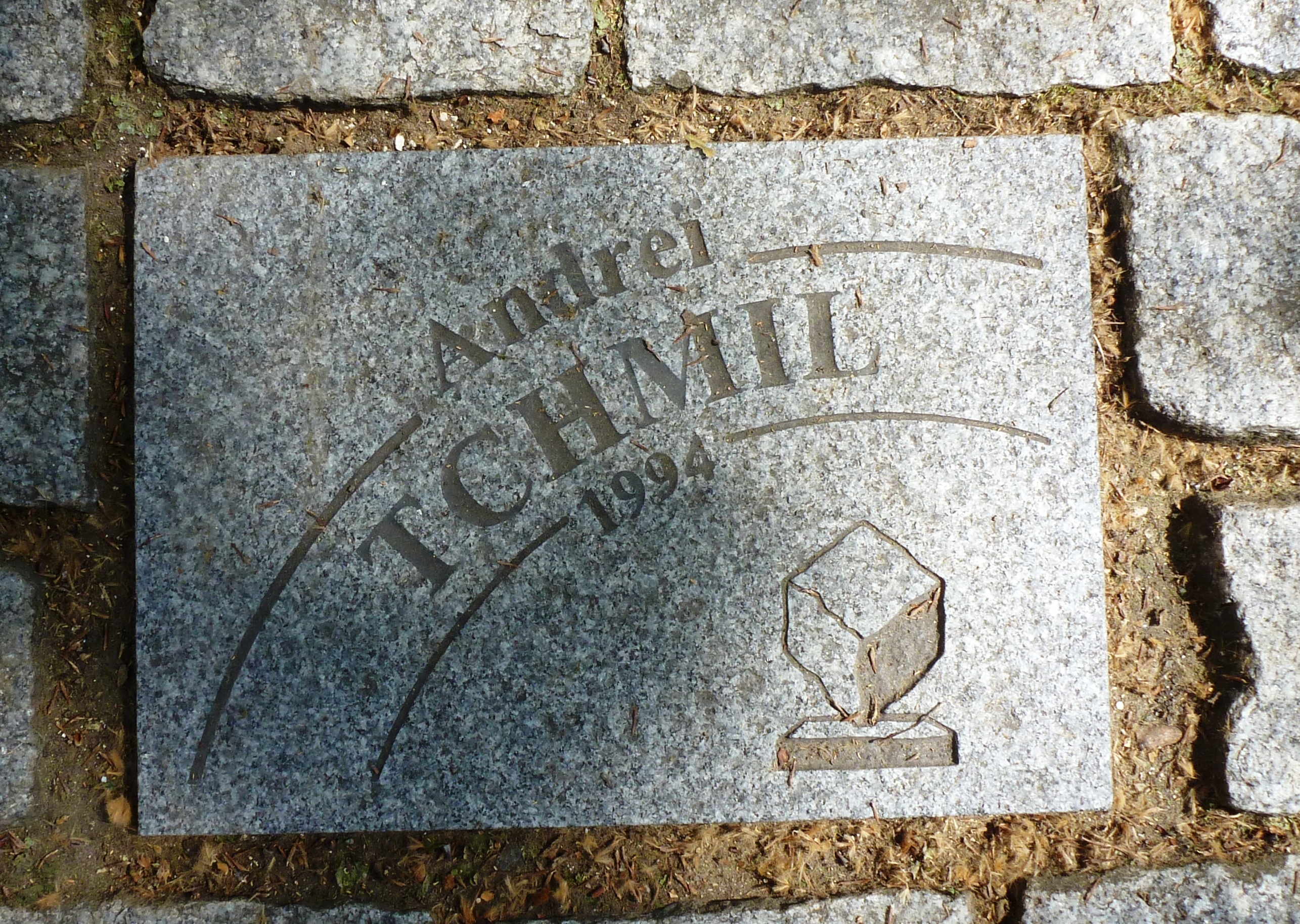 Pflasterstein für Andrei Tchmil auf der Allée Charles Crupelandt in Roubaix